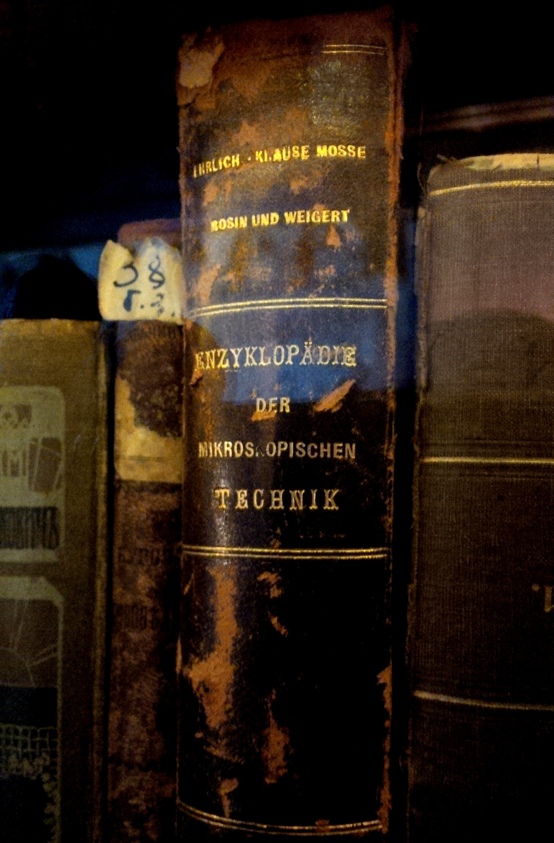 Paul Ehrlich e.a. - Enzyklopädie der mikroskopischen Technik - im Kafe Puschkin in Moskau